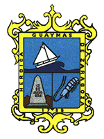 Escudo del municipio sonorense.